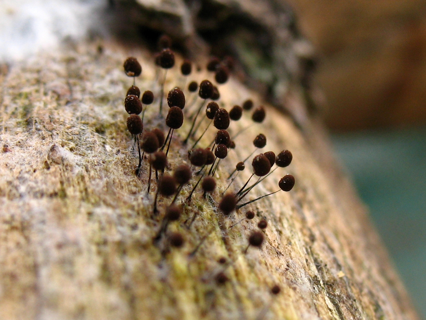 Comatricha nigra (Pers.) J. Schröt.